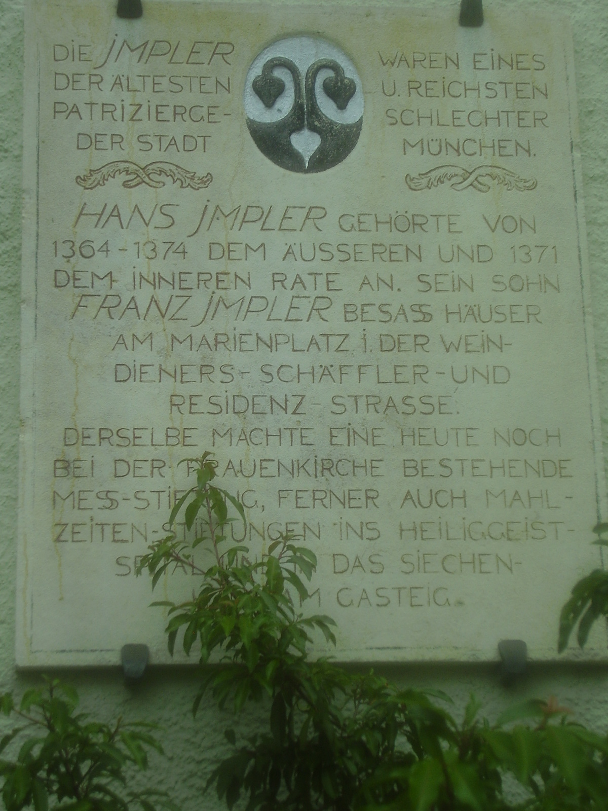 Impler, Münchner Patriziergeschlecht; Inschrift an der Volksschule an der Implerstraße in Sendling